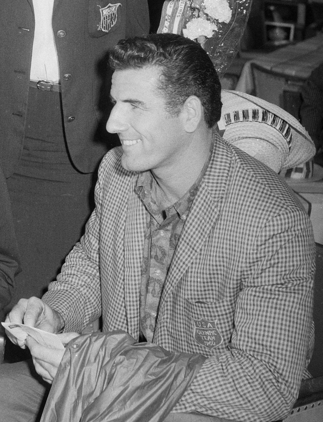 Aankomst Amerikaanse Olympische atleten op Schiphol, Don Bragg